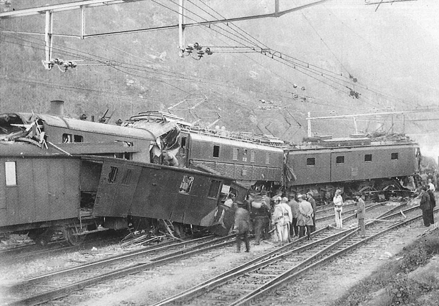 Eisenbahnunfall in Bellinzona am 23. April 1924: Hinter dem stark beschädigten Gepäckwagen ist der obere Teil des Heizwagens von Zug 70 zu erkennen.